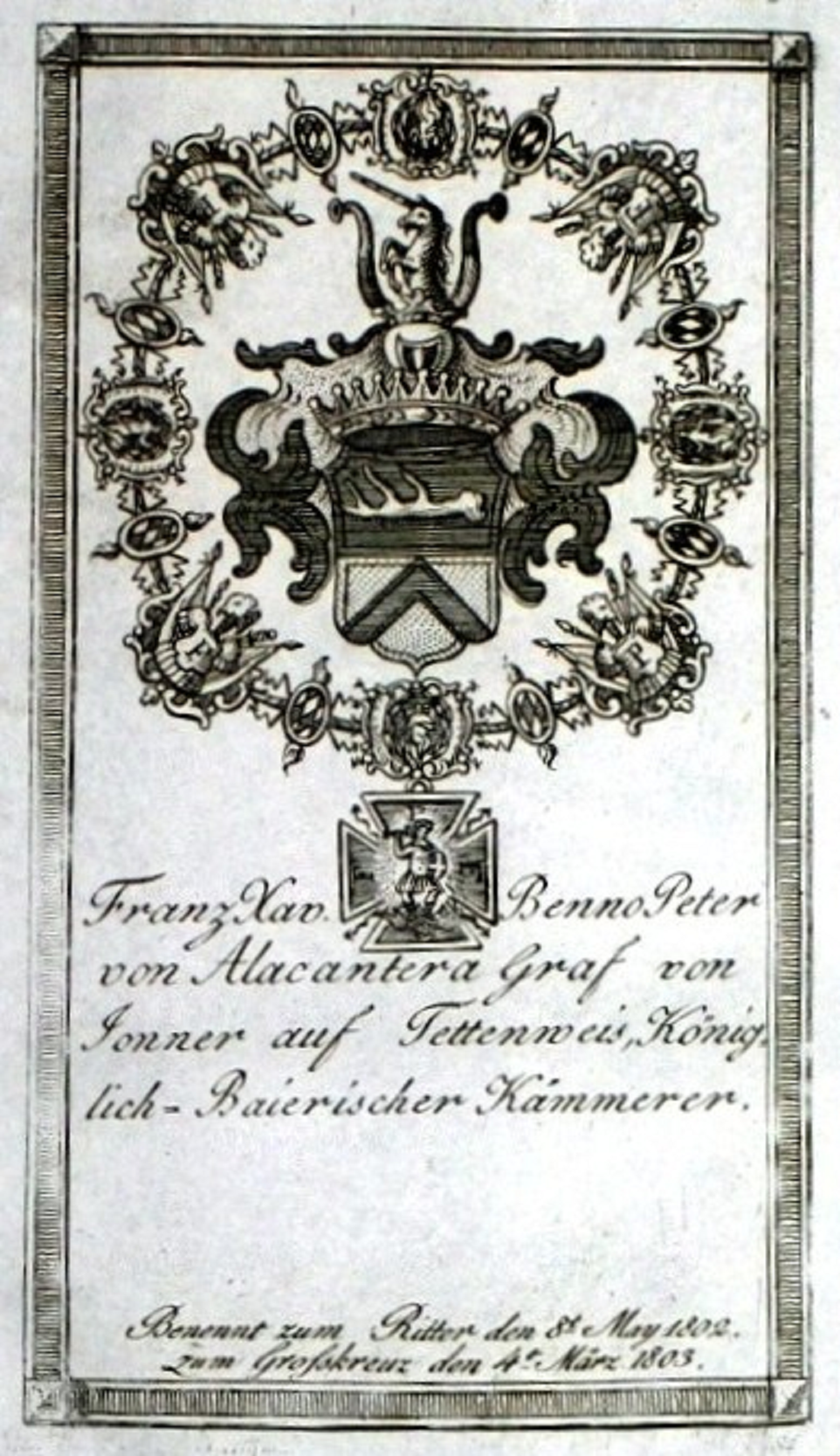 Wappen des Franz Xav. Benno Peter von Alacantera Graf von Jonner auf Tettenweis, Königlich-Baierischer Kämmerer, Ritter zum Großkreuz des Königlich Bayerischen Ordens vom Heiligen Michael